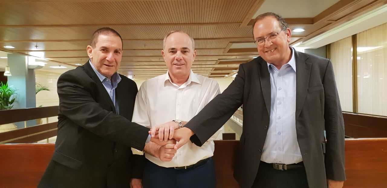 מימין: עופר בלוך, מנכ"ל חברת החשמל, ד"ר יובל שטייניץ ,שר האנרגיה, יו"ר דירקטוריון חברת החשמל, האלוף במיל' יפתח רון- טל